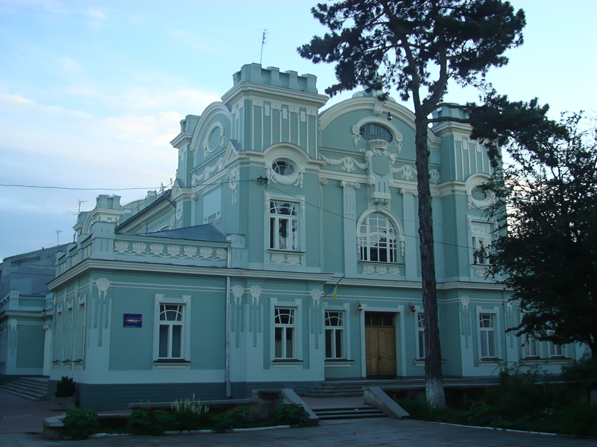 Міський будинок культури в Стрию